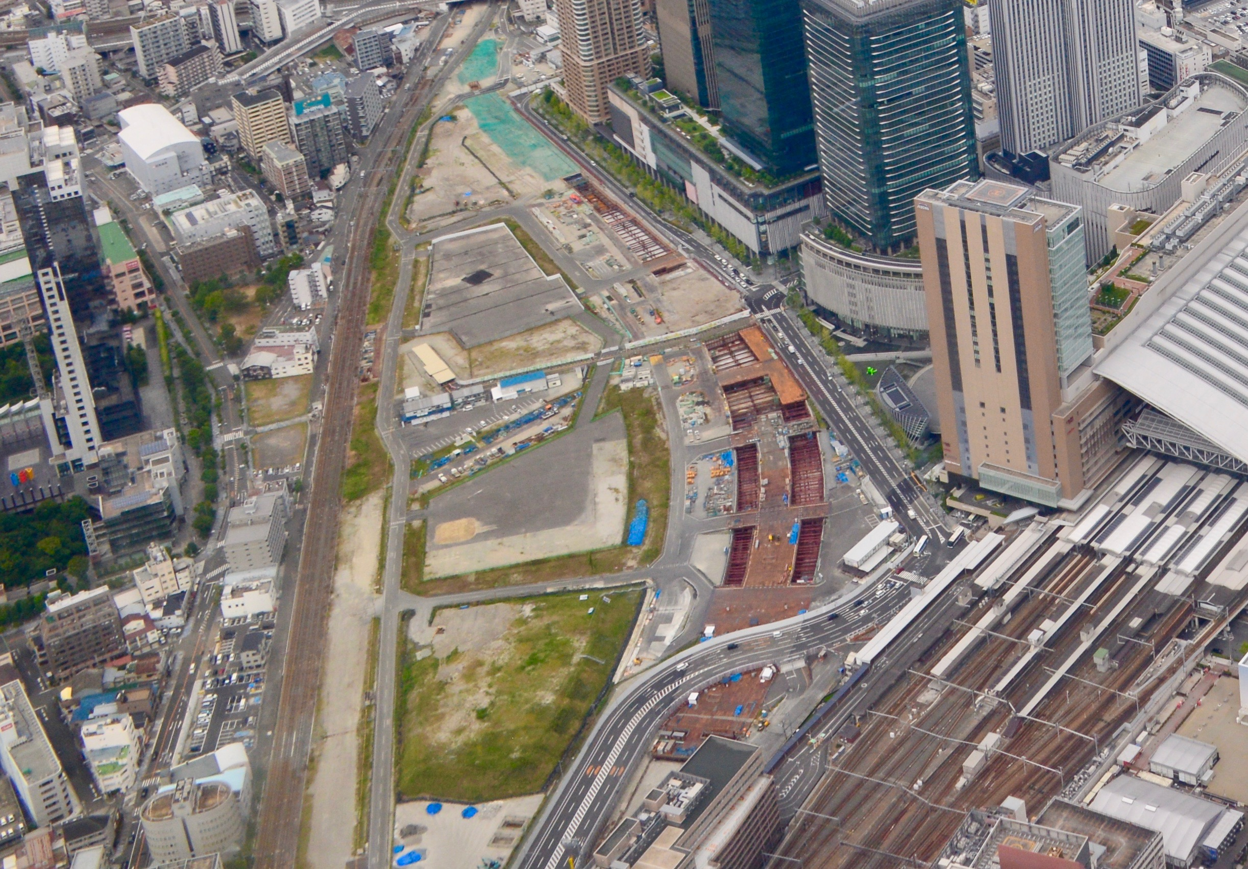 北梅田駅周辺。伊丹空港へ着陸する機内より撮影